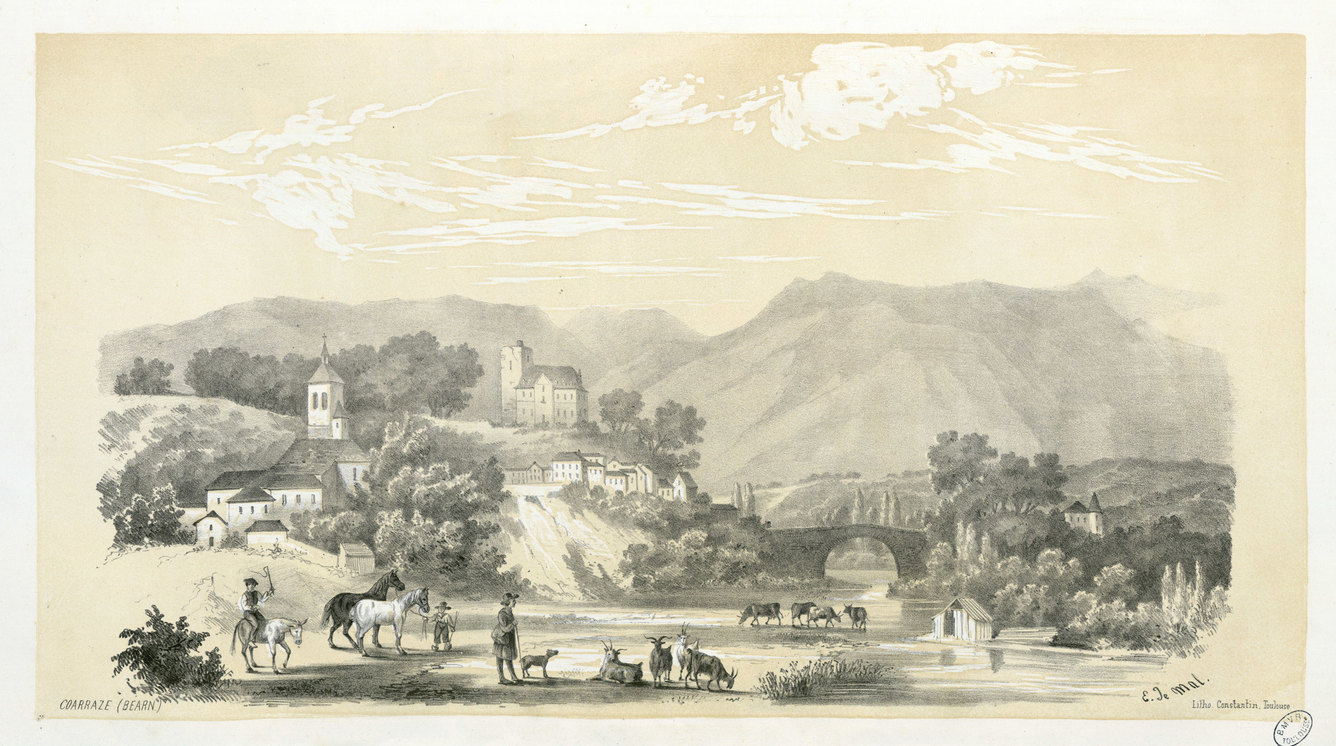 Fait partie d'un recueil de 15 planches lithographiées en camaïeu avec titre lithographié Ancely, René (1876 - 1966). Possesseur